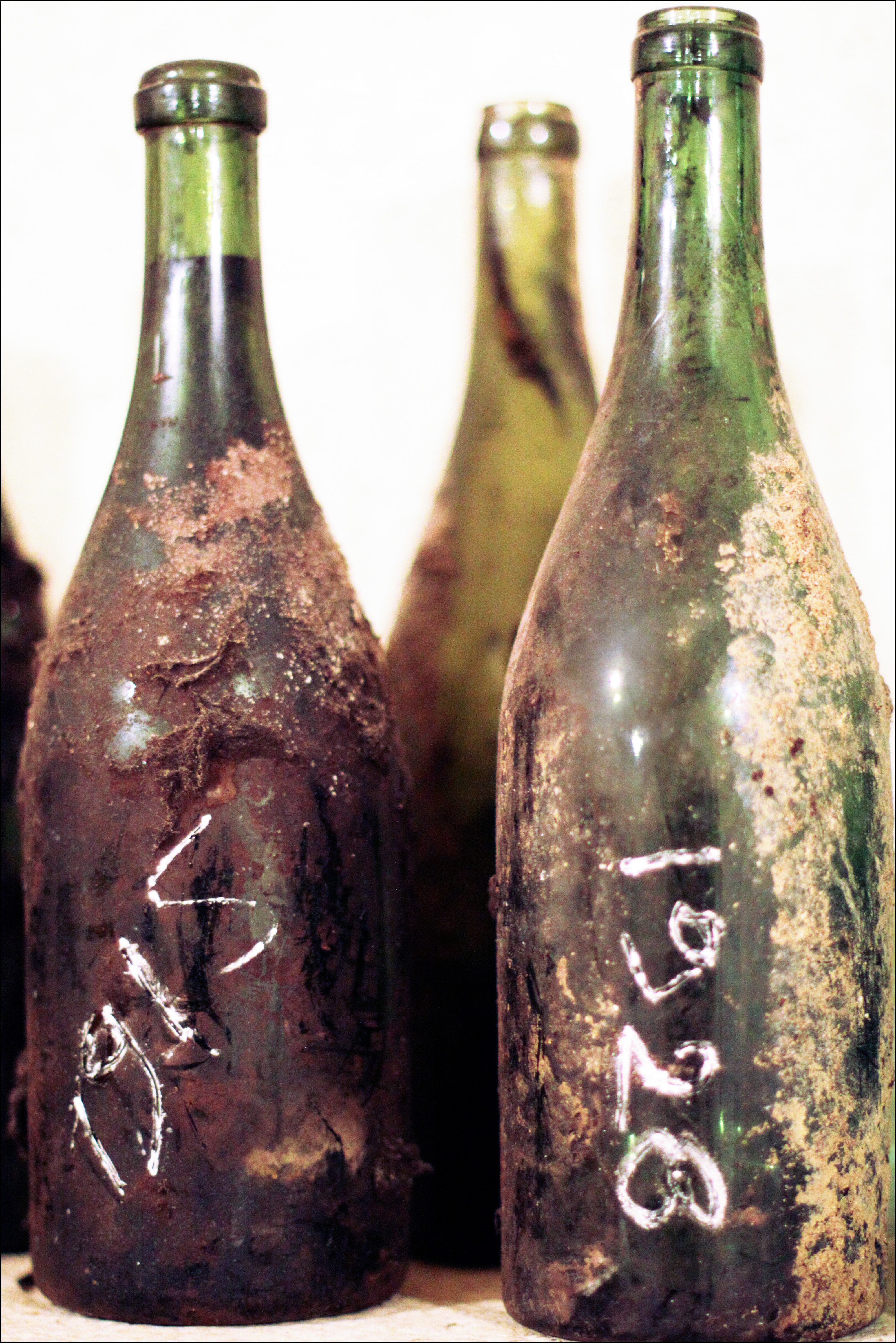 Vieilles bouteilles de Chassagne-Montrachet